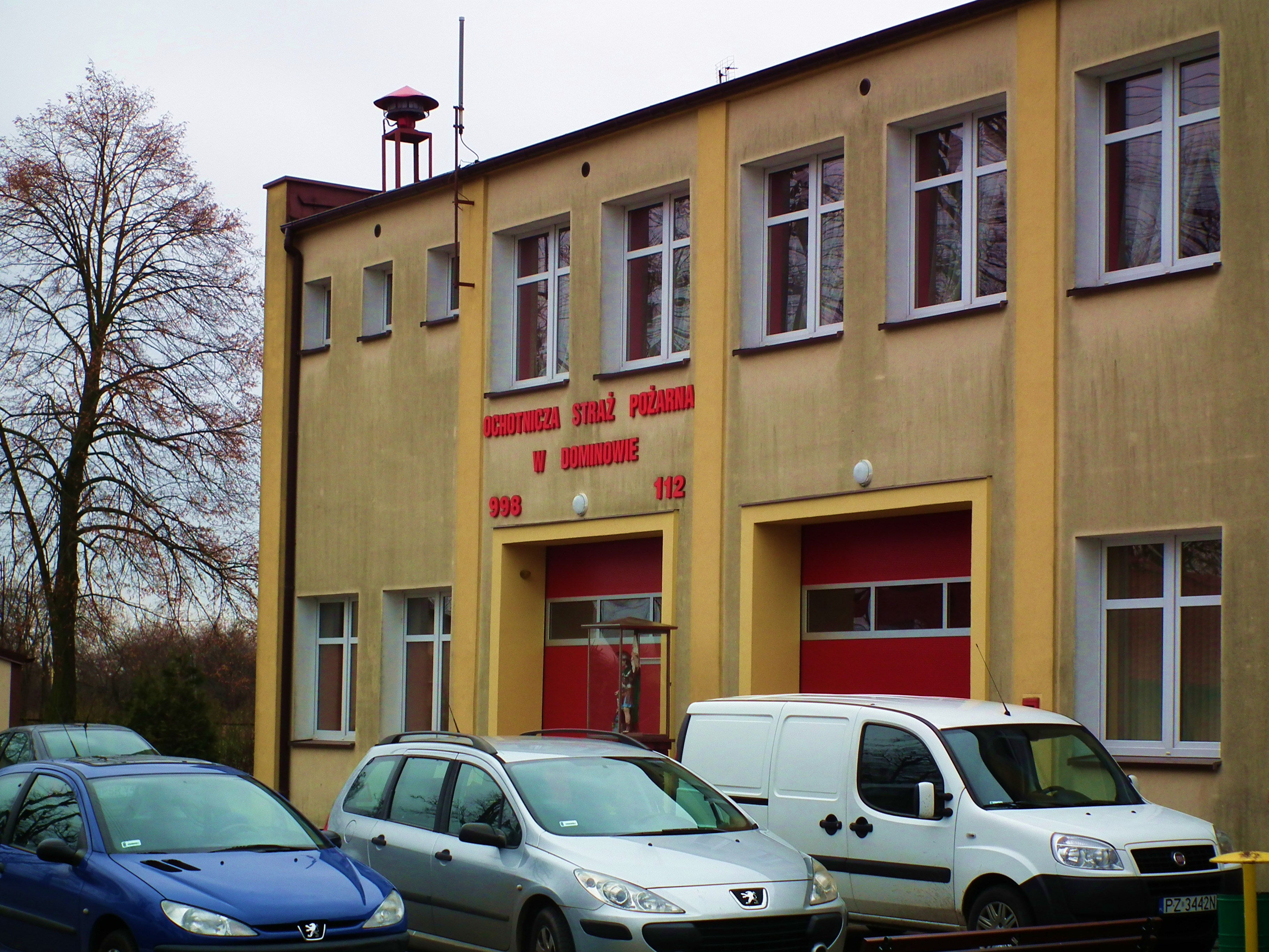 OSP Dominowo.